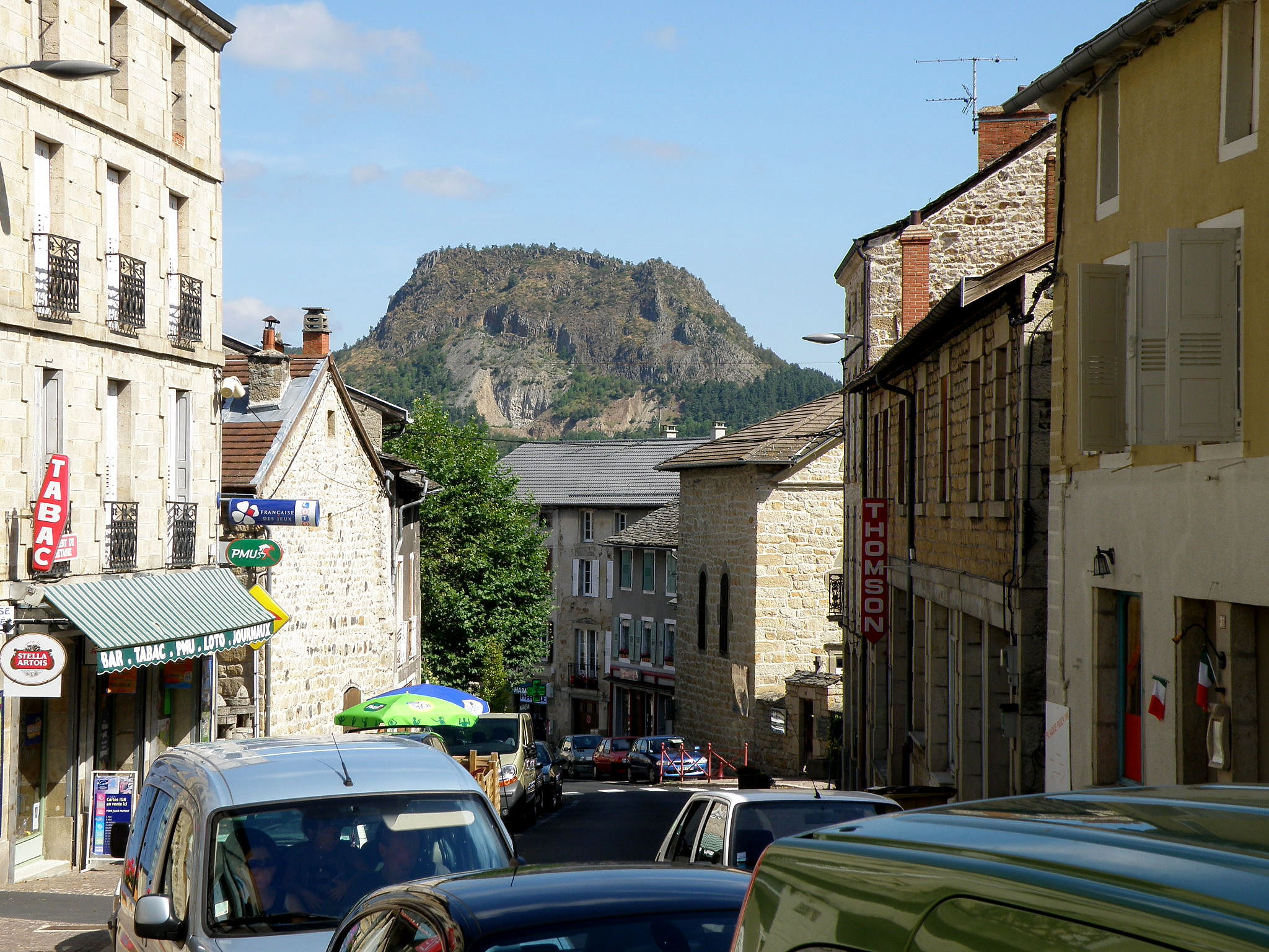 Saint-Julien-Chapteuil, dép. de la Haute-Loire, France (région Auvergne). Rue principale. Regard tourné vers le nord. Au fond : le suc de Monac (alt. 1022m, comm. de Saint-Pierre-Eynac), distant d'env. 2km.